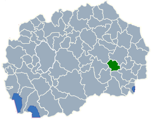 Map of Opština Konče (Конче)